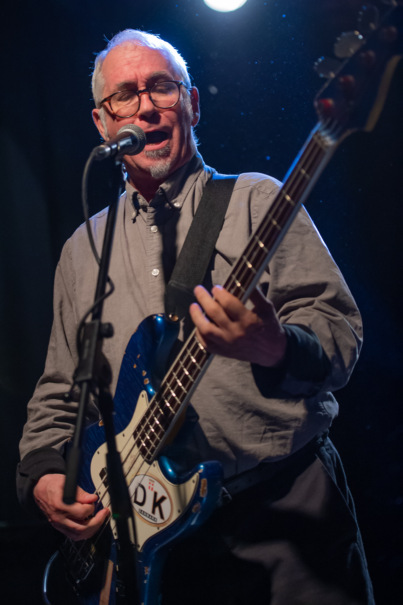 Concertbüro Franken,Dead Kennedys,Der Hirsch,Geoffrey Lyall,Klaus Flouride,Konzert,Livekonzert,Livemusik